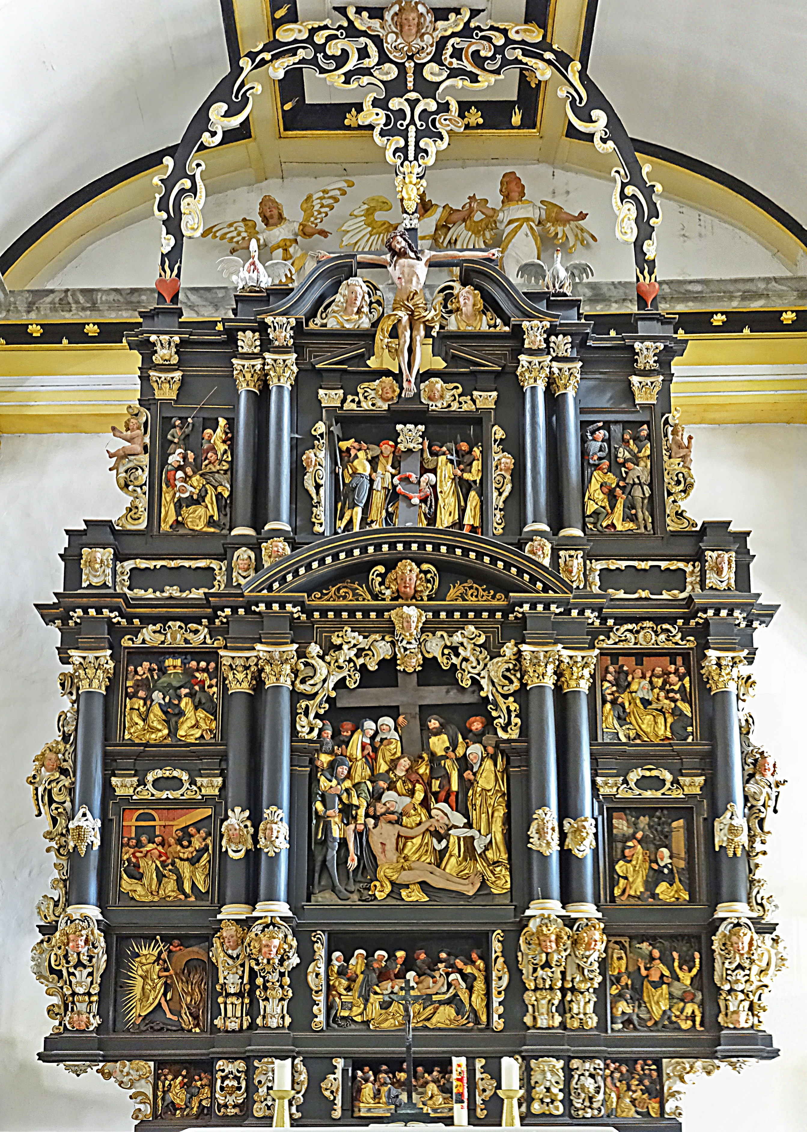 Hochaltar der Pfarrkirche St. Peter und Paul (Gräfentonna). Ursprünglich fertigte ein Bamberger Meister die Schnitzreliefs für eine Kapelle in Grimmenthal. Herzog Ernst der Fromme holte in den Reformationswirren die geschnitzten Bildtafeln für einen Barockaltar in die Schlosskirche nach Gotha. Als Altar und Kanzel auch dort weichen mussten, gelangten beide 1692 nach Gräfentonna.